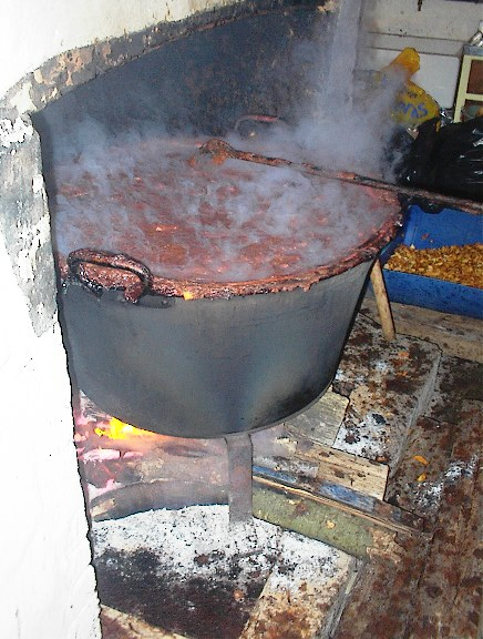 Eune séthée d'nièr beurre en Jèrri au mais d'Octobre 2002 / Black butter evening in Jersey in October 2002